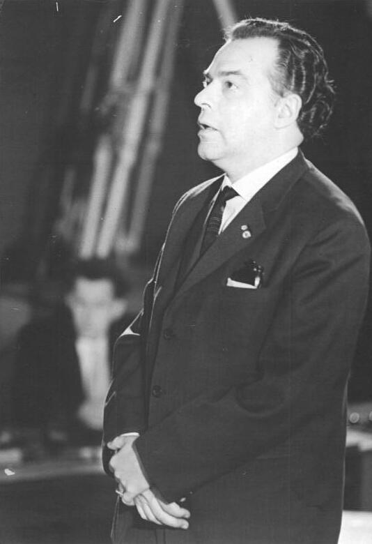 Oberstes Gericht, Globke-Prozess, Aussage, Peter Edel Zentralbild Stöhr-11.7.1963 1. Strafsenat setzte Verhandlung gegen Globke fort. Der 1. Strafsenat des Obersten Gerichts der DDR setzte am 11.7.1963 die Hauptverhandlung gegen den millionenfachen Judenmörder Globke fort. Im Mittelpunkt steht heute der Komplex der berüchtigten "Endlösung der Judenfrage". Wie am Vortage sagten zahlreiche Zeugen aus, die die faschistische Judenverfolgung am eigenen Leibe erlebten. UBz: Die Aussage des Berliner Journalisten und Schriftstellers Peter Edel war eine einzige flammende Anklage gegen den millionenfachen Mörder Globke und seine Helfer namens aller, die das Grauen nicht überlebten. Laut wiederholte Peter Edel im Gerichtssaal das Vermächtnis seiner Mithäftlinge: "Wenn du überlebst, berichte vor allem den Jungen, was hier geschehen ist, sage, wer uns den Viehstempel aufgedrückt hat".